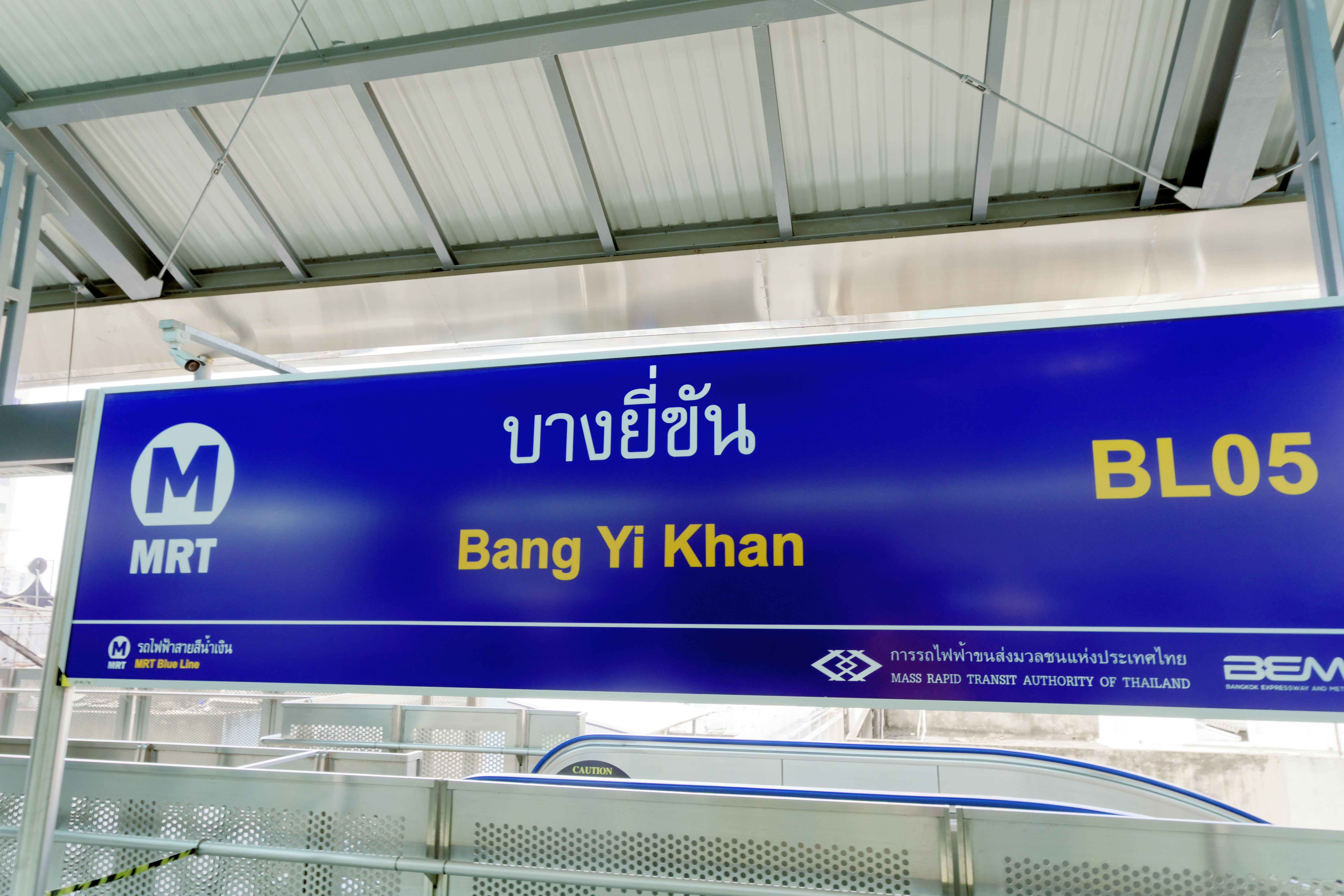 MRT Bang Yi Khan – Traditional sign